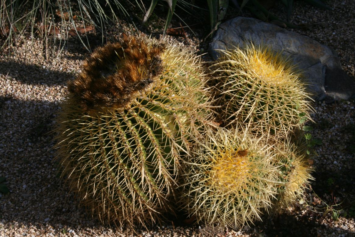 Echinocactus grusonii (Mexikó) a madridi Real Jardín Botanico gyűjteményében